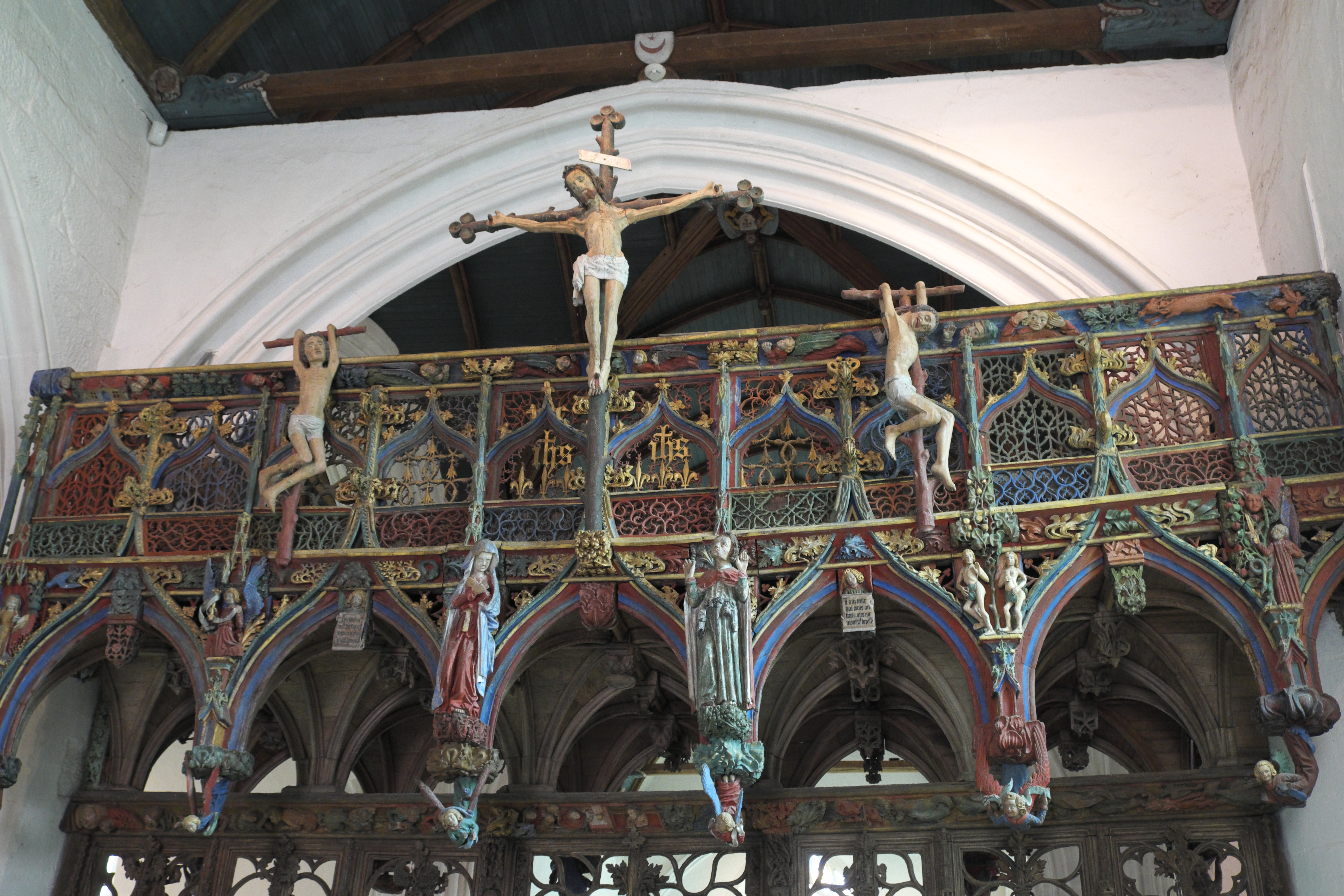 Kapelle Saint-Fiacre in Le Faouët im Département Morbihan (Region Bretagne/Frankreich), Lettner